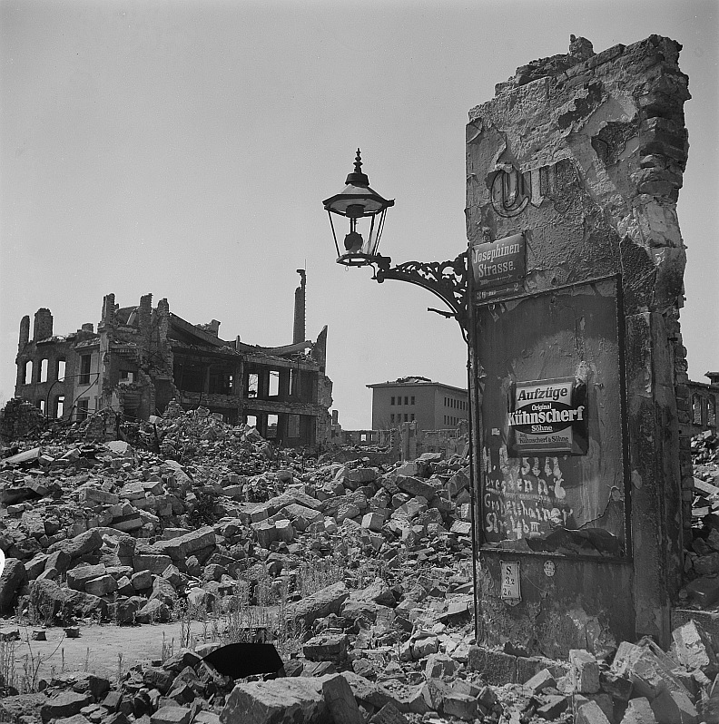 Original image description from the Deutsche FotothekFassadenstück einer Ruine mit Gaslaterne